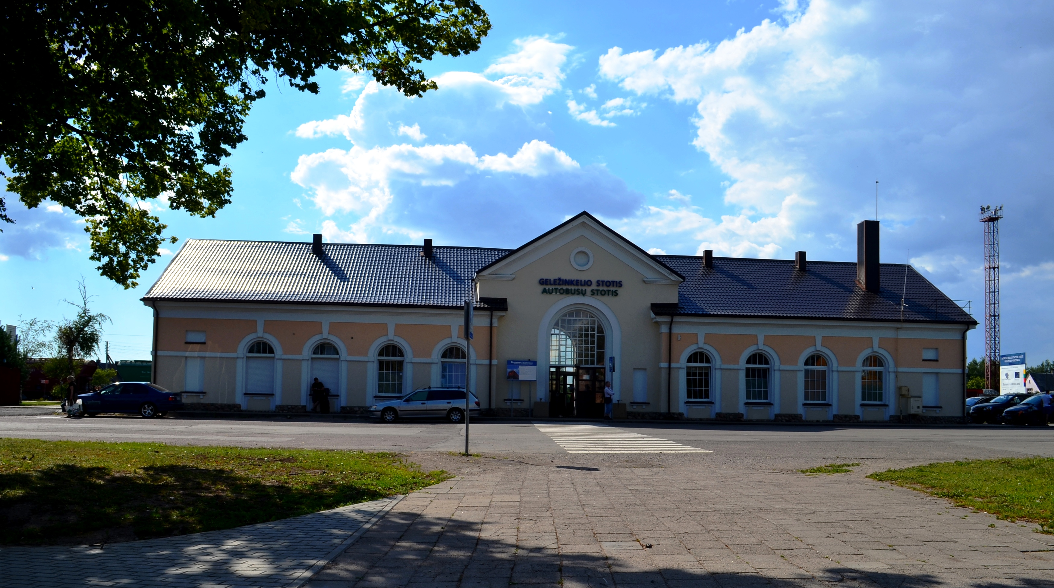 Kretingos geležinkelio ir autobusų stotis